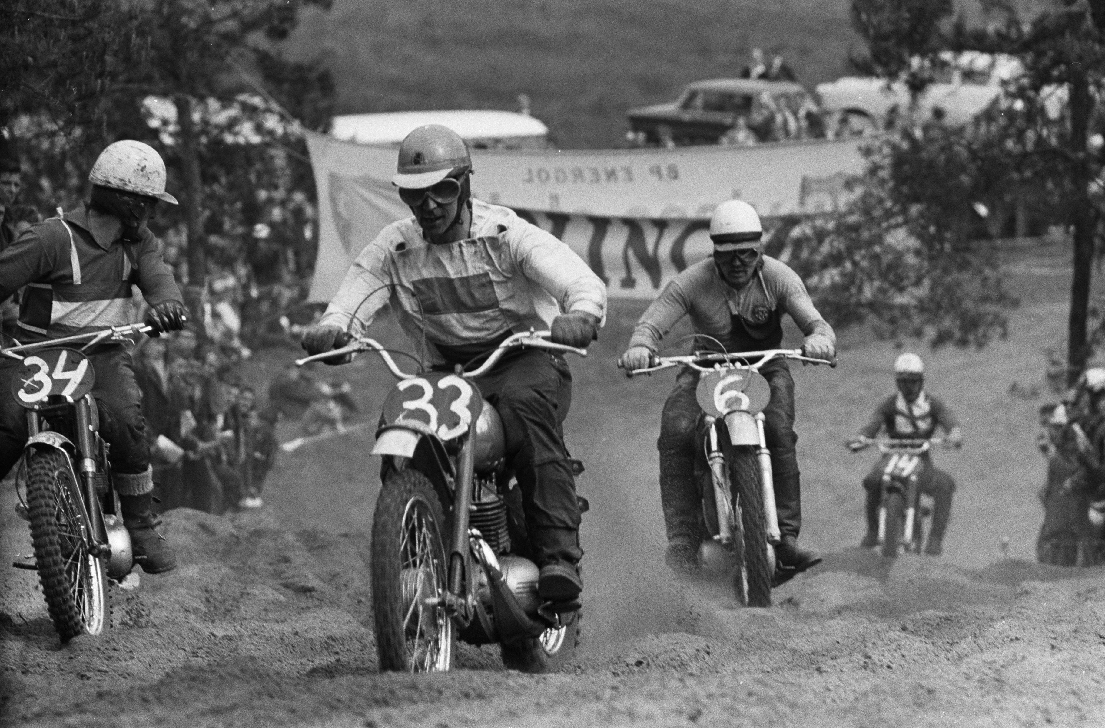 Collectie / Archief : Fotocollectie Anefo Reportage / Serie : [ onbekend ] Beschrijving : Motorcros 1962 De Zandberg te Bergharen (Jan Clynk, Frits Selling. Frits Betzelbacher en Arno (Finland) Datum : 3 juni 1962 Locatie : Bergharen Trefwoorden : motorcross Persoonsnaam : Arno, [...], Betzelbacher, Frits, Clynk, Jan, Selling, Frits Fotograaf : Pot, Harry / Anefo, [onbekend] Auteursrechthebbende : Nationaal Archief Materiaalsoort : Negatief (zwart/wit) Nummer archiefinventaris : bekijk toegang 2.24.01.05 Bestanddeelnummer : 913-9873